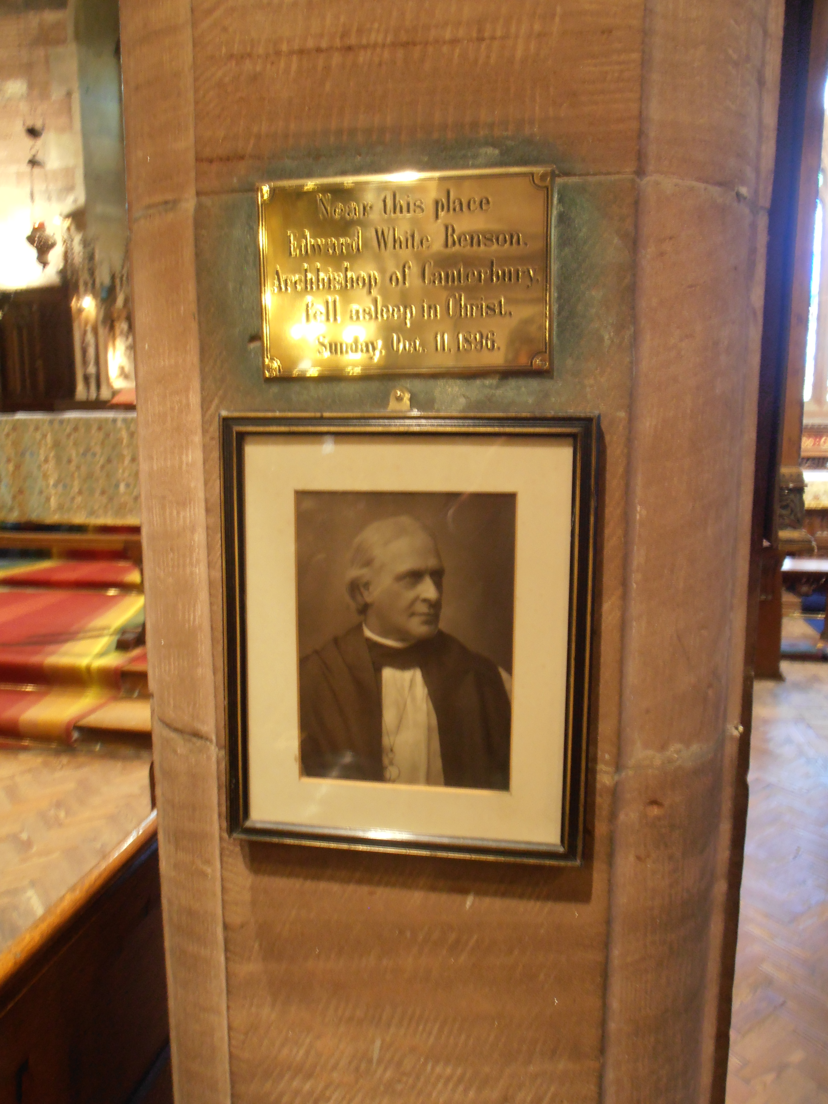 Eglwys Sant Deiniol / St Deiniol, Penarlâg, Sir y Fflint. Yma y mae cofeb W E Gladstone. Adeilad graddedig ll*.